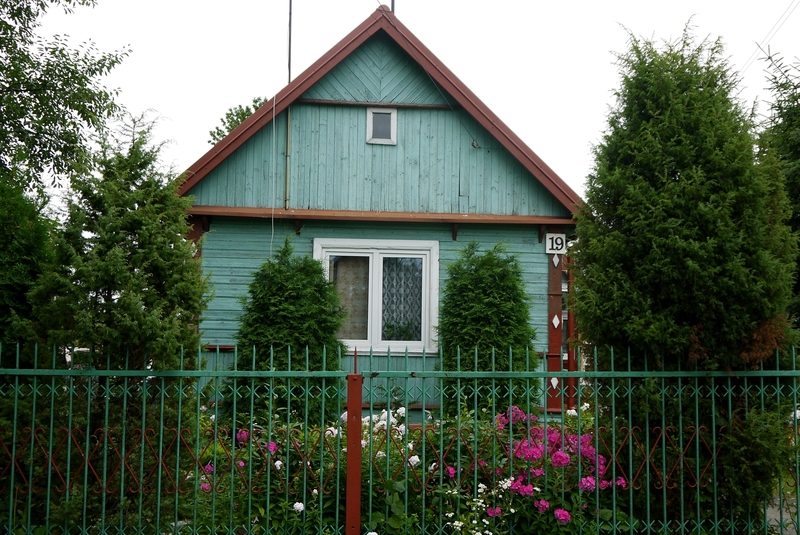 jeden z zachowanych drewnianych domów w dzielnicy Starosielce